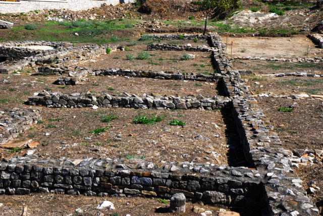 Area archeologica in località Macchia, Circello (BN), Italia. Qui, nel II sec. a.C. il console Bebio deportò, a più riprese, circa 50.000 Liguri che avevano combattuto contro i Romani nelle Alpi Apuane.